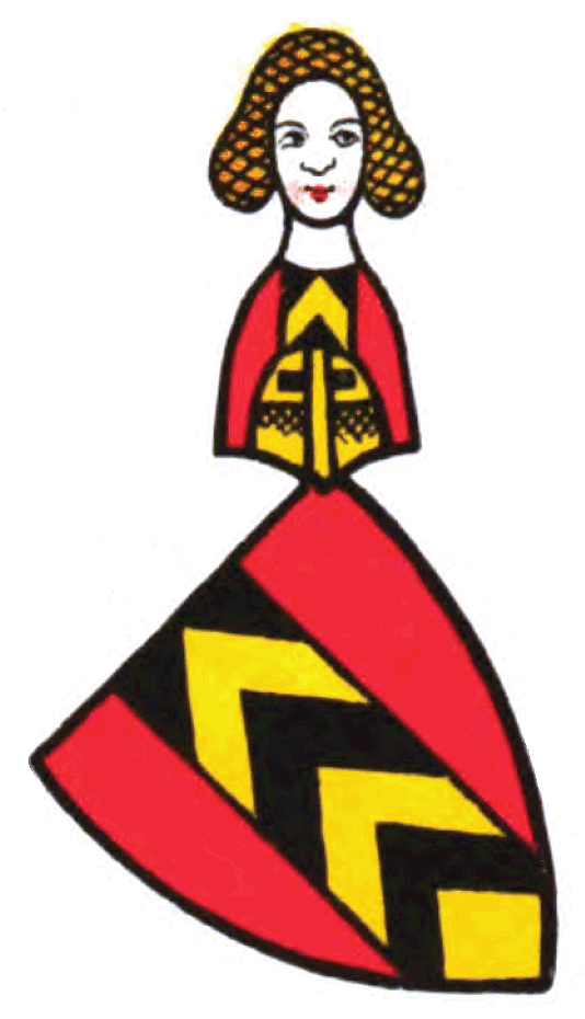 Wappen der Neuenburg-Niedau